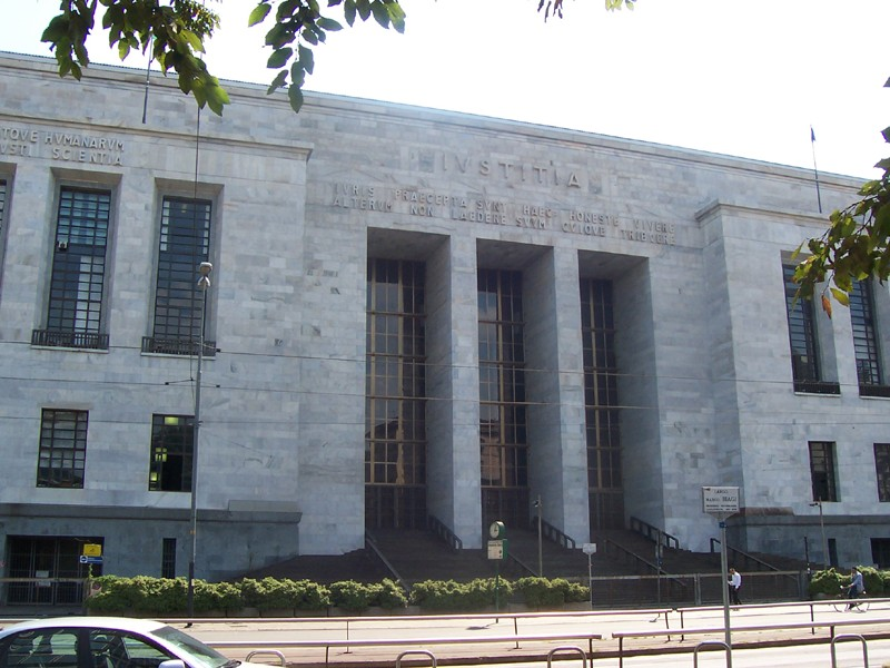 Milano - Palazzo di Giustizia